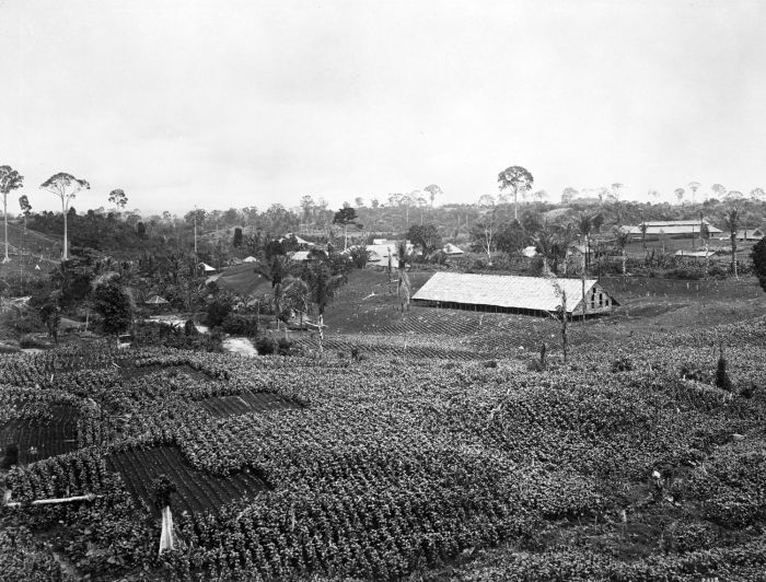 Foto. The Gambir tobacco plantation near Arnhemia Tabaksplantage Gambir bij Arnhemia